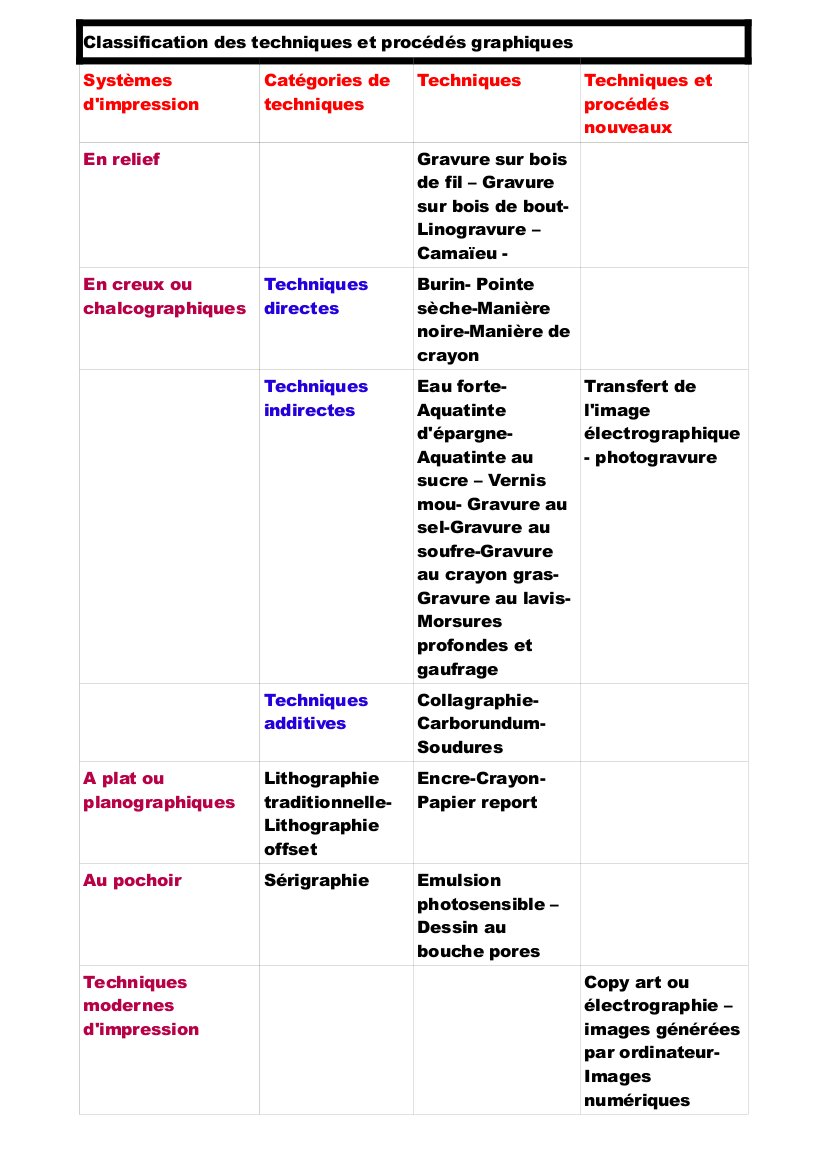 Tableau résumant les différentes techniques de gravures